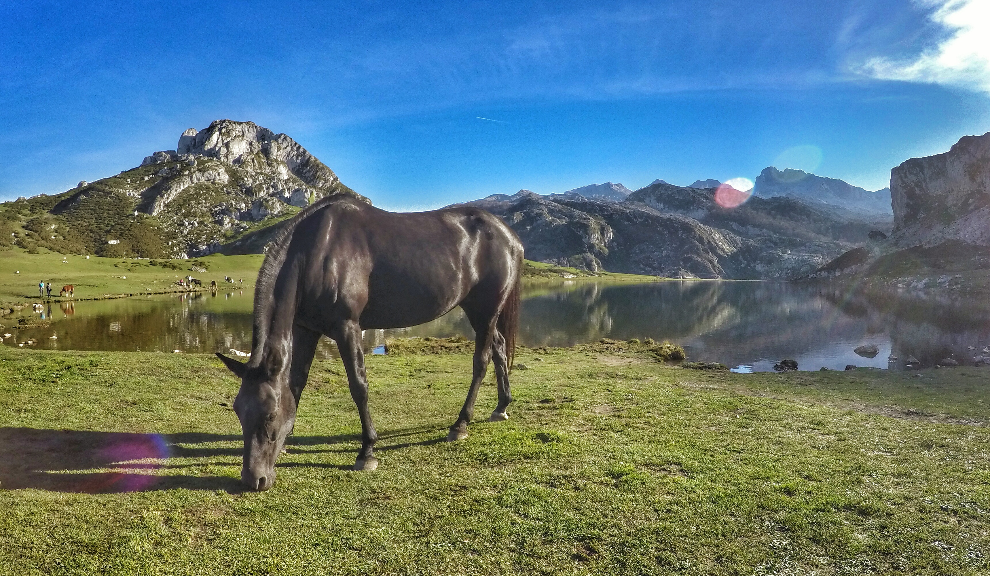 Caballo pastando junto al lago Ercina, en los Picos de Europa.